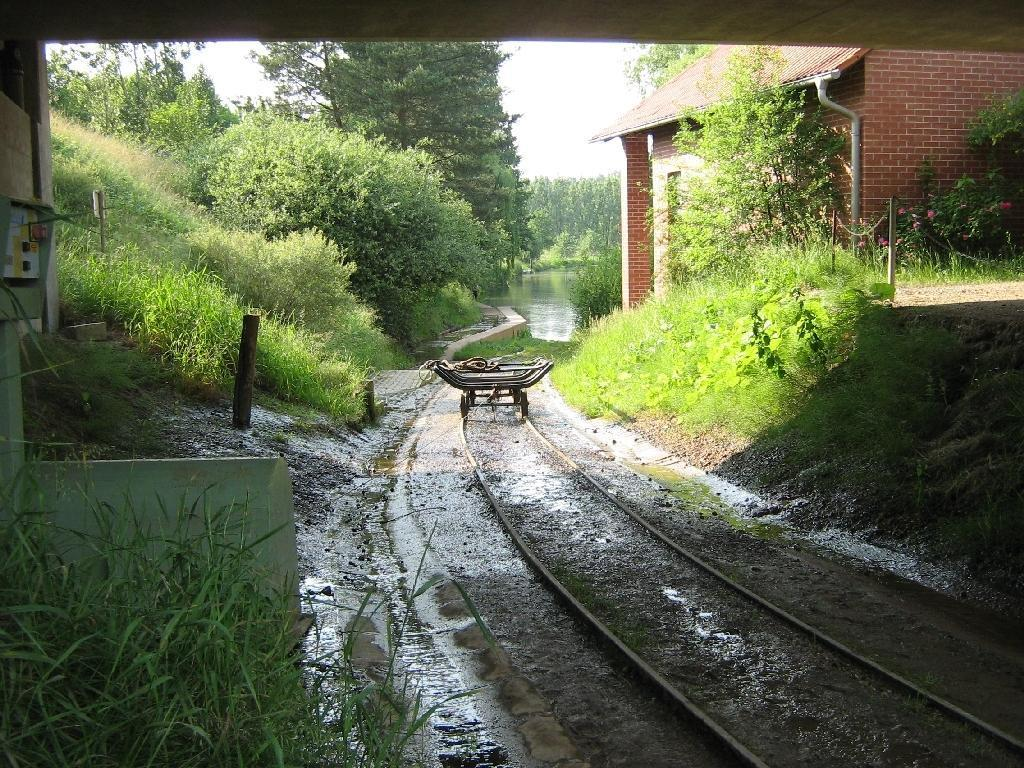 Der Dahme-Umflutkanal in Märkisch-Buchholz. Bootswagen zur Überwindung des Wassergefälles (Landkreis Dahme-Spreewald, Brandenburg)